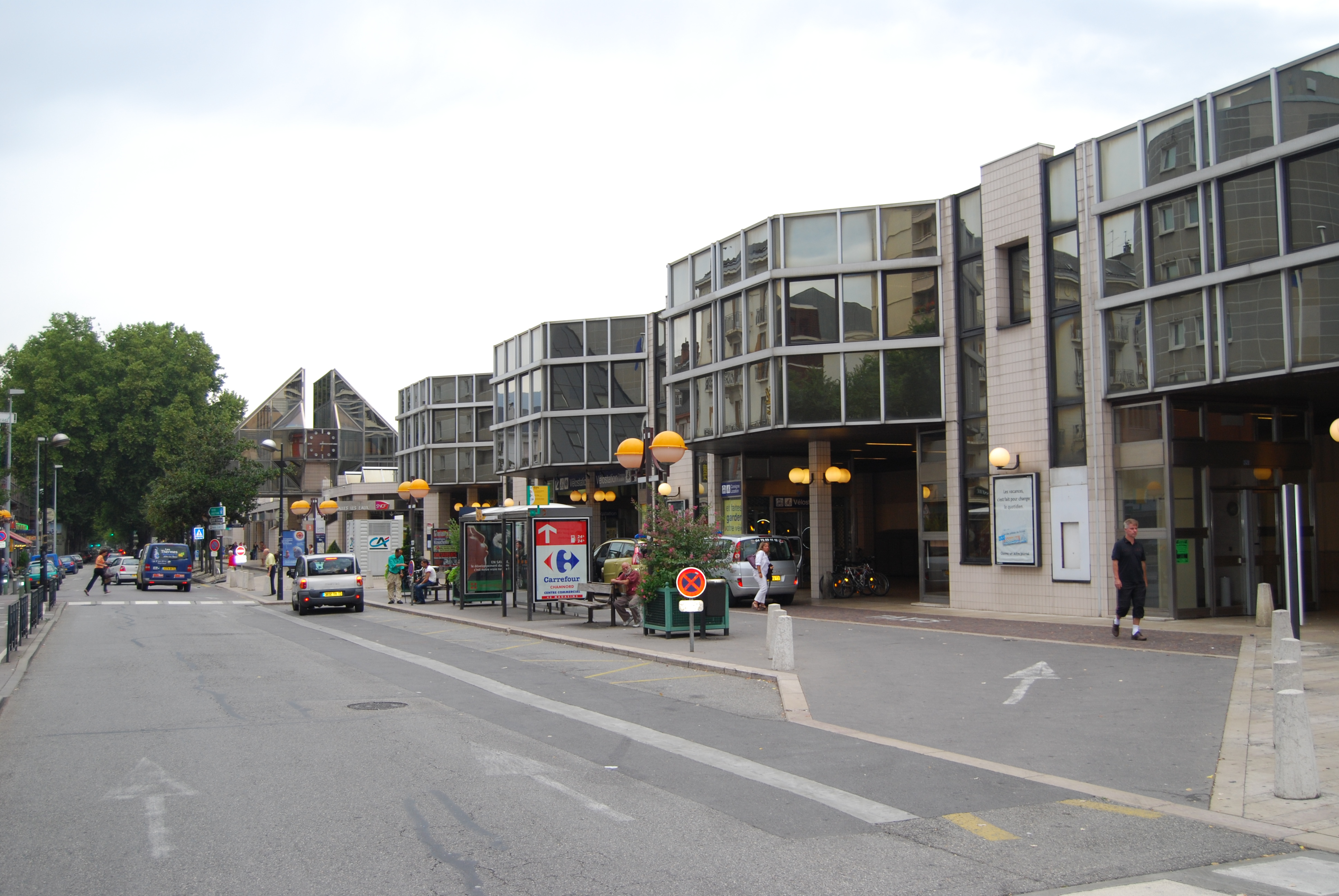 Gare de Chambéry - Challes les Eaux, construite en 1856, modifiée en 1864, 1882 et 1907, puis très profondèment de 1985 à 1988 pour lui donner sa configuration actuelle. La célèbre Rotonde n'est pas visible sur l'image.